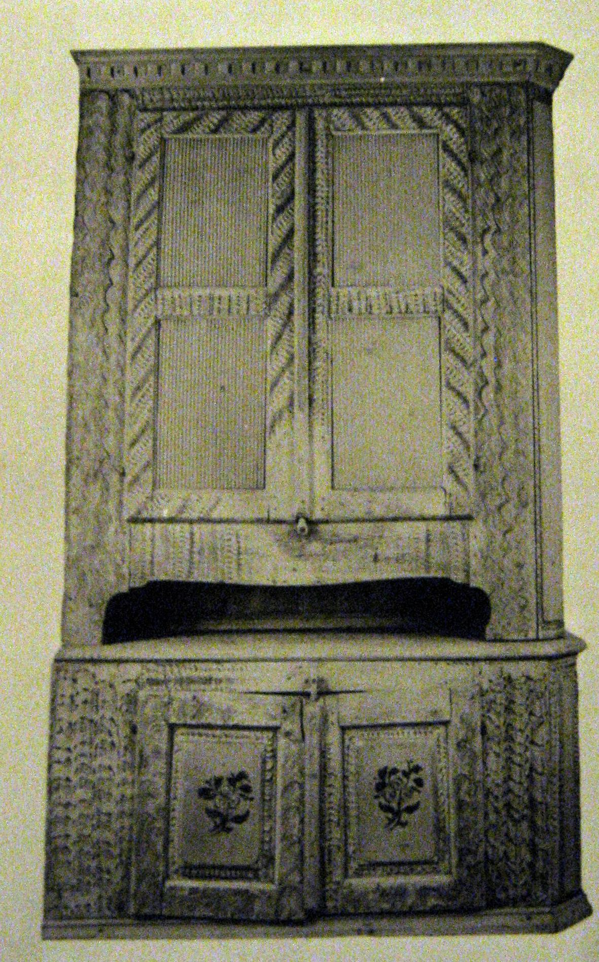 Väggskänk med öppen mellandel från Nordmalings socken, Ångermanland. Ur Nordiska Museet samlingar